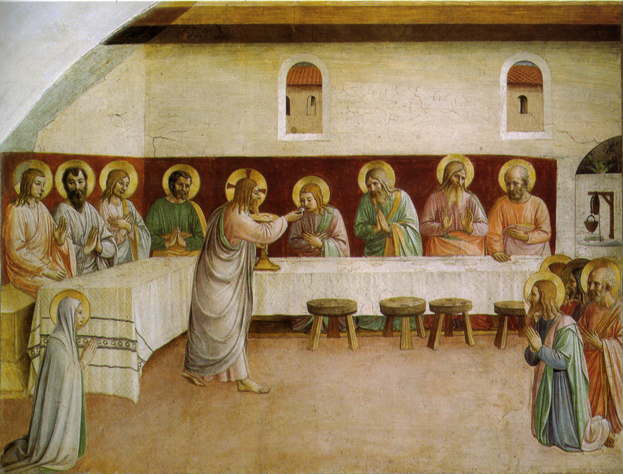 Comunione degli apostoli, cella